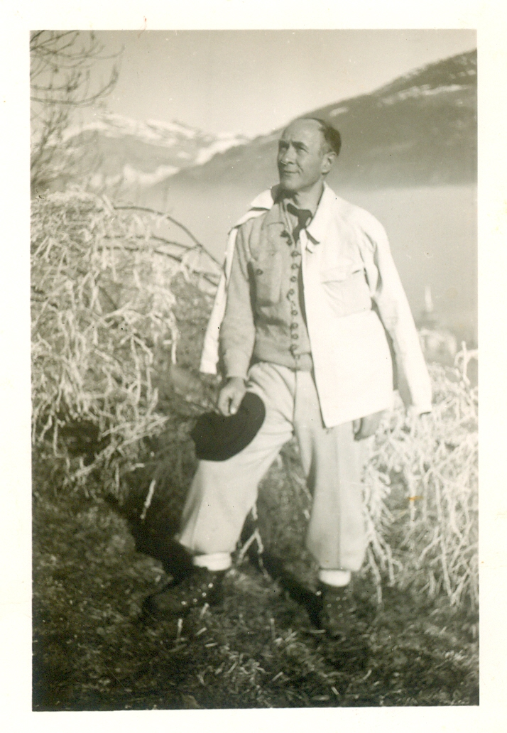 ד"ר משה הר אבן, רופא פסיכואנליטקאי ומראשוני הרוויזיוניסטים בארץ ישראל, רופא בבית החולים גהה